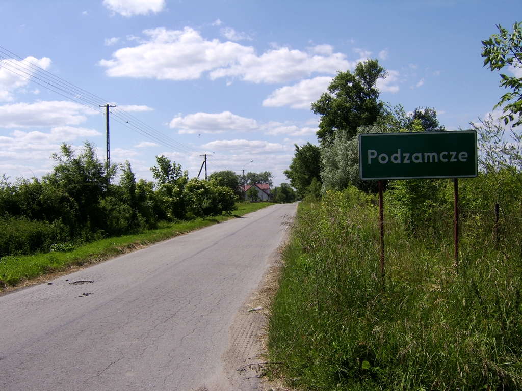 Wieś Podzamcze